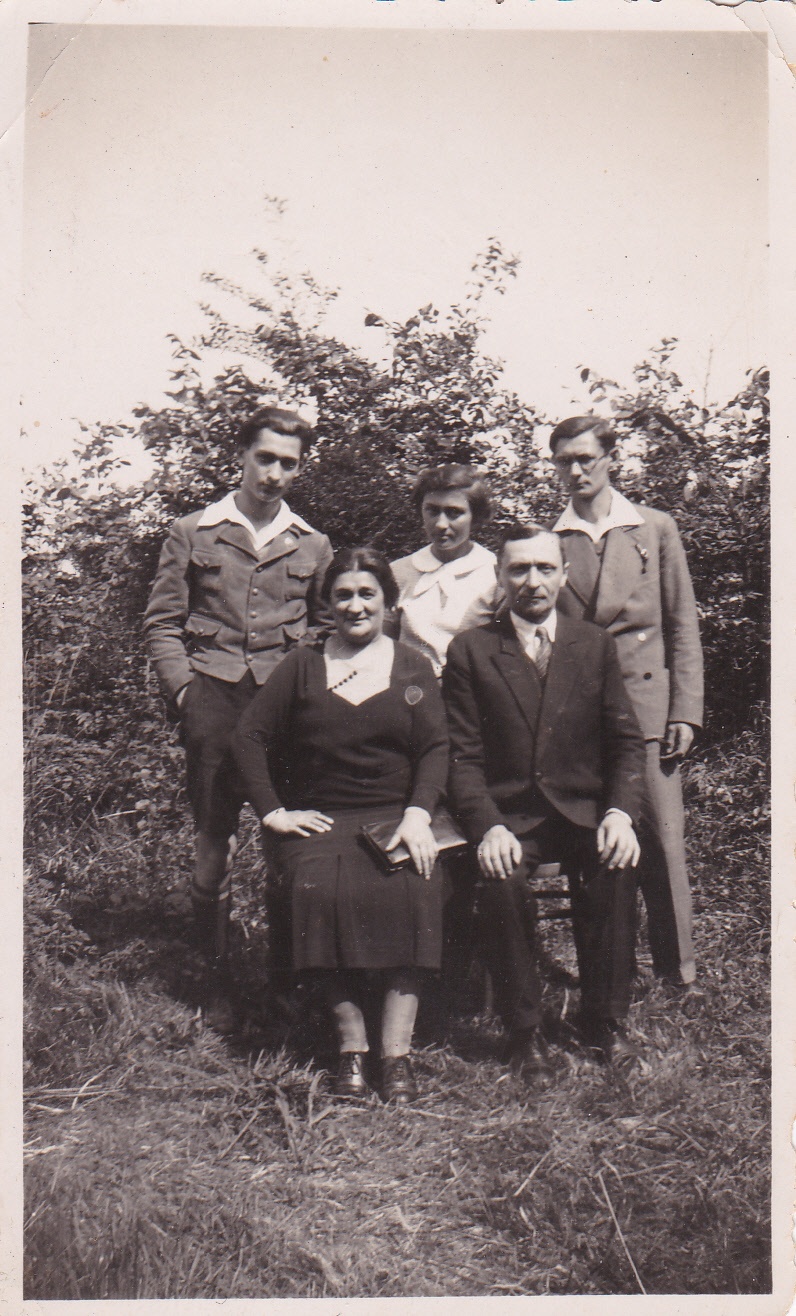 גולה מירה עם משפחתה, מימין האח יוסף, משמאל האח פנחס. יושבים האב נפתלי והאם גיזלה קרולינה